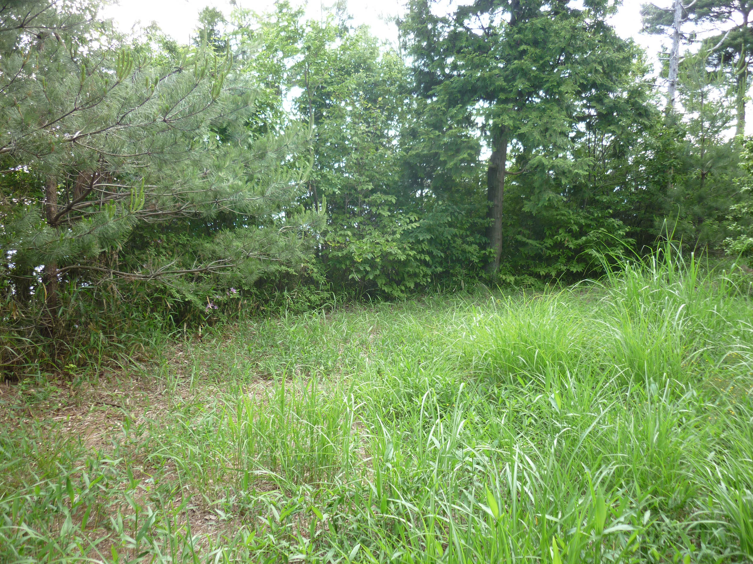 曲輪跡